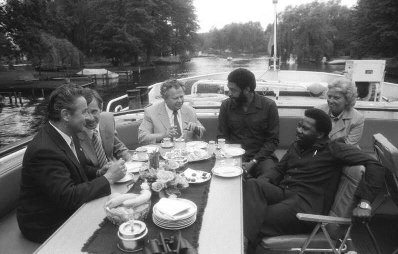 ADN-ZB Reiche 10.6.82 Berlin: Besuch Bishop Die Partei-und Regierungsdelegation Grenadas unter Leitung des Vorsitzenden des Politbüros des ZK der Neuen Jewel Bewegung und Ministerpräsidenten der Revolutionären Volksregierung Grenadas, Maurice Bishop, unternahm am 9.6. mit dem Motorschiff "Köbis"eine Seerundfahrt auf den Berliner Gewässern. Der Gast wurde von Hermann Axen, Mitglied des Politbüros und Sekretär des ZK der SED (3.v.l.), und Heinz Kuhrig, Minister für Land, Forst und Nahrungsgüterwirtschaft (l.) begleitet. Rechts; Unison Whitemann, Mitglied des Politbüros der Neuen Jewel Bewegung und Minister für Auswärtige Angelegenheiten Grenadas.